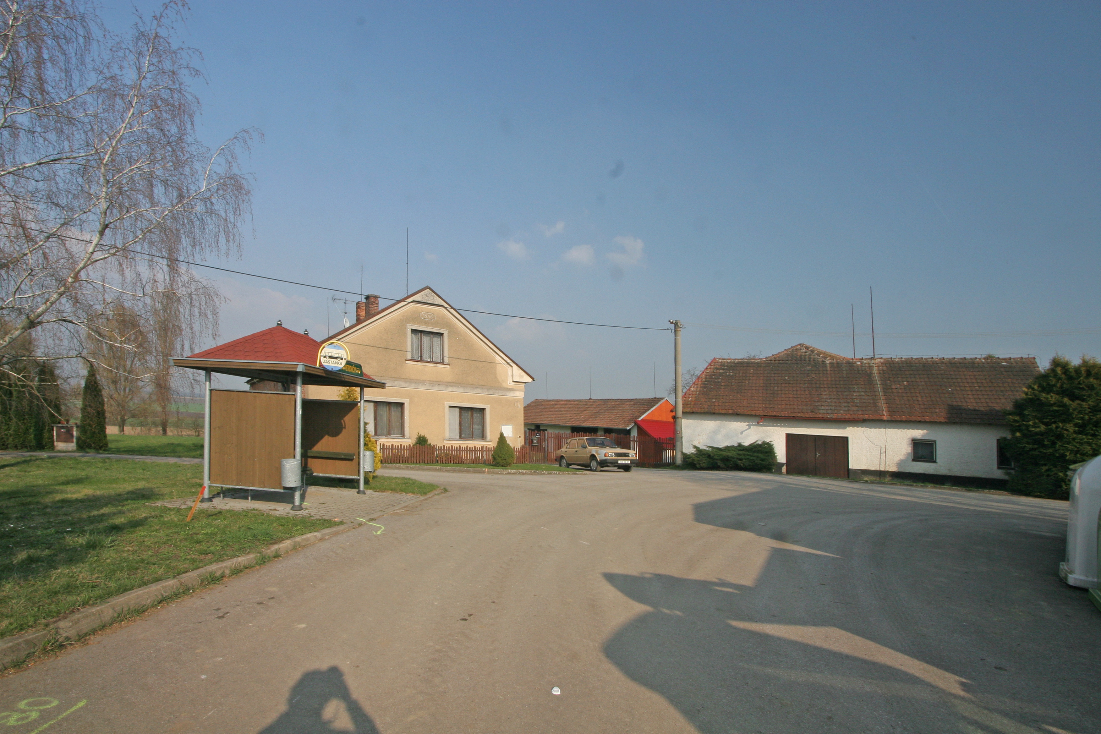 Petrovičky zastávka